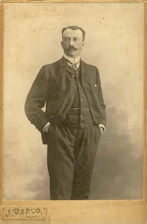 Photo familiale de Jules Corrard des Essarts (1865-1911) mon arrière-grand-oncle